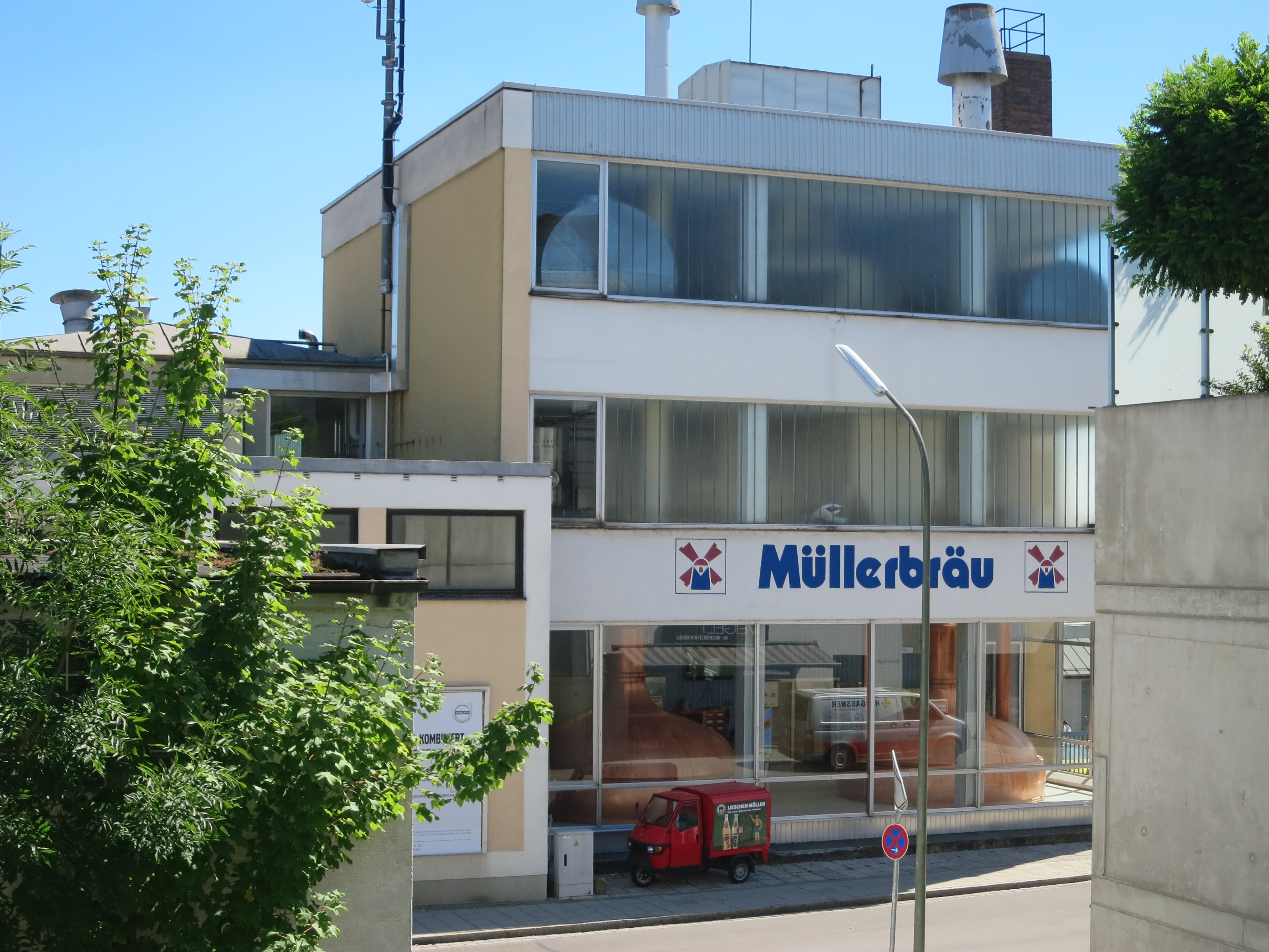 Das Sudhaus vom Kellerberg gesehen